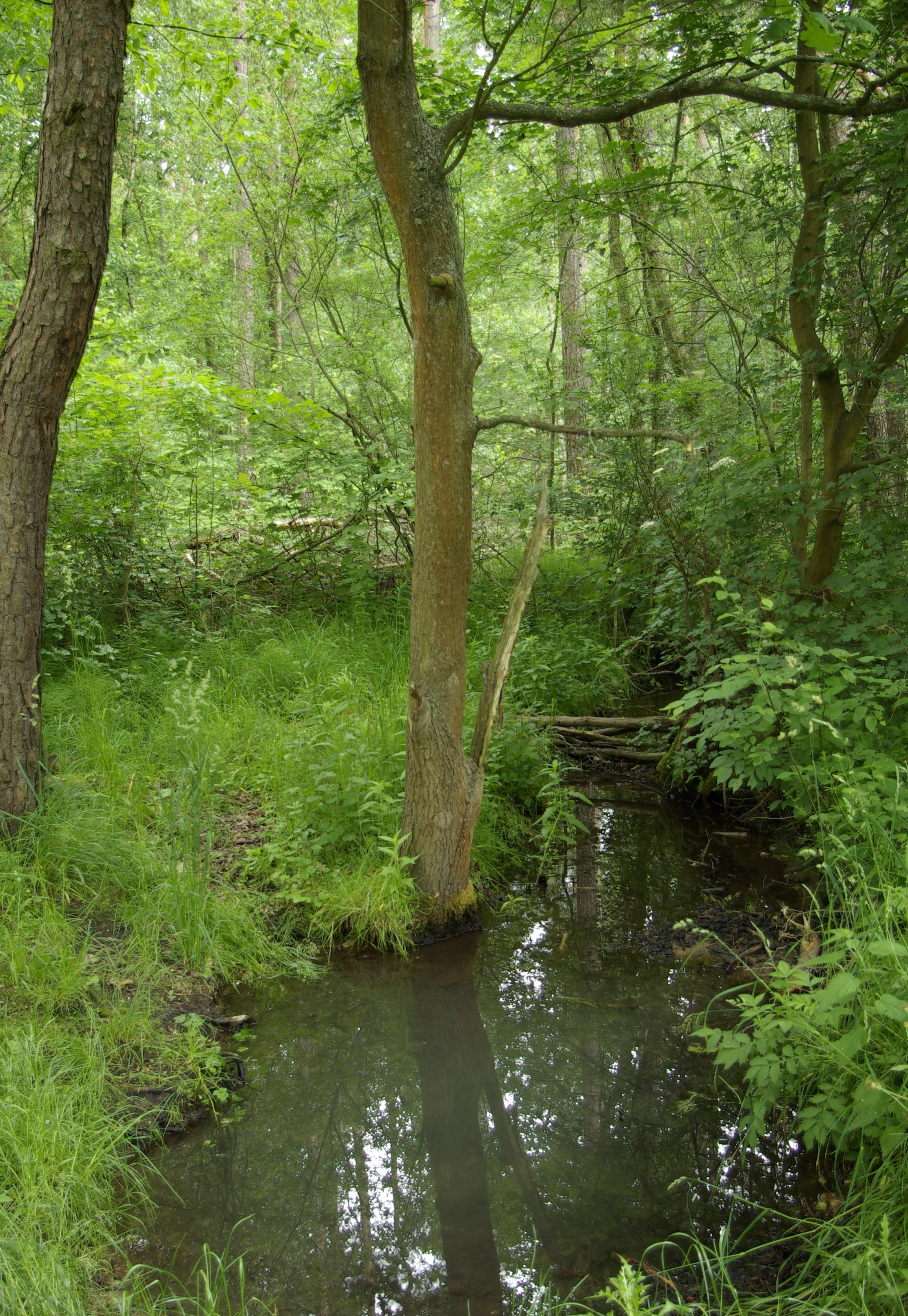 Naturschutzgebiet Brucker Lache in Erlangen.